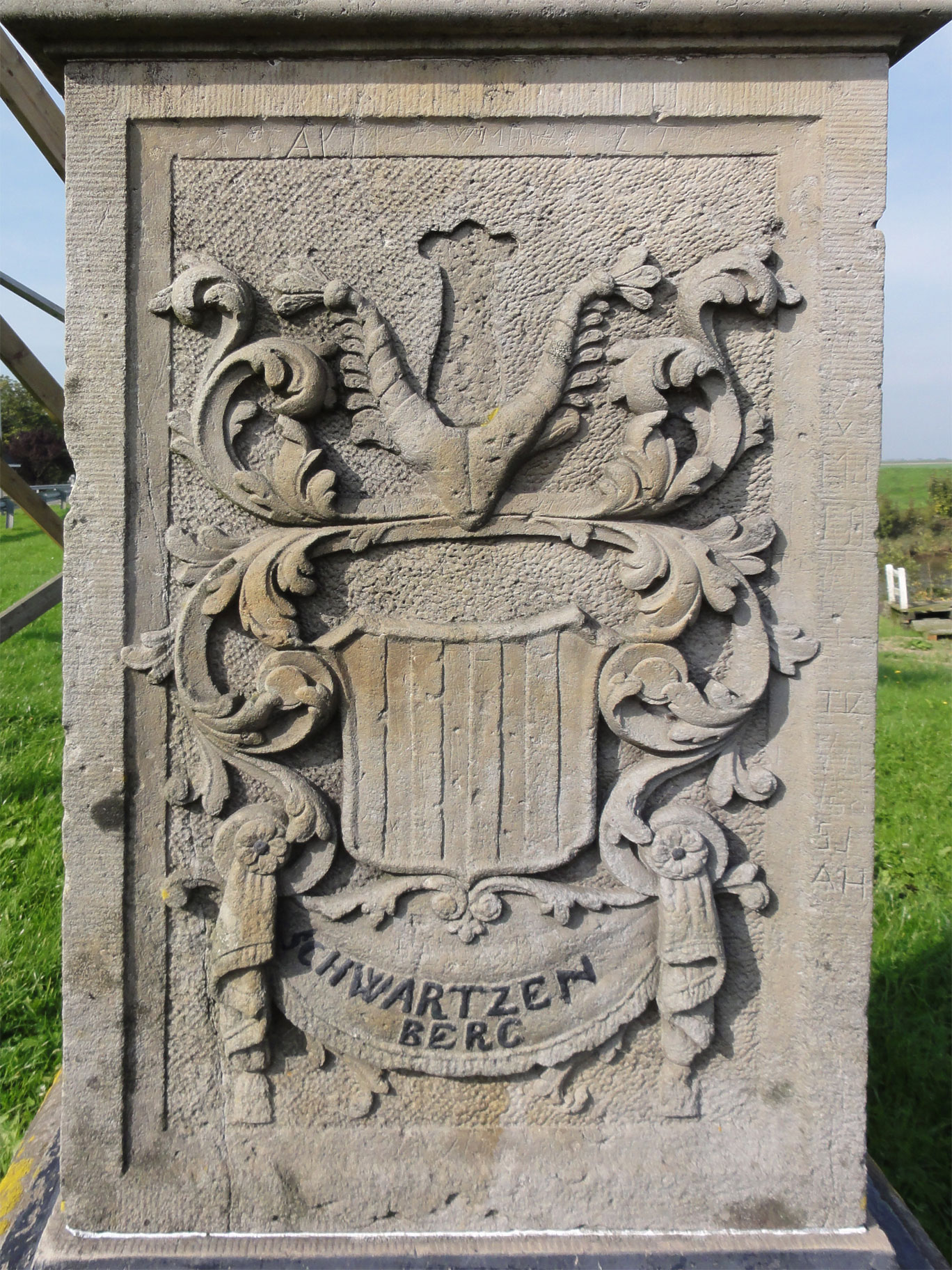 Wapen van Michael Onuphrius thoe Schwartzenberg en Hohenlansberg op het gedenkteken bij de Dokkumer Nieuwe Zijlen